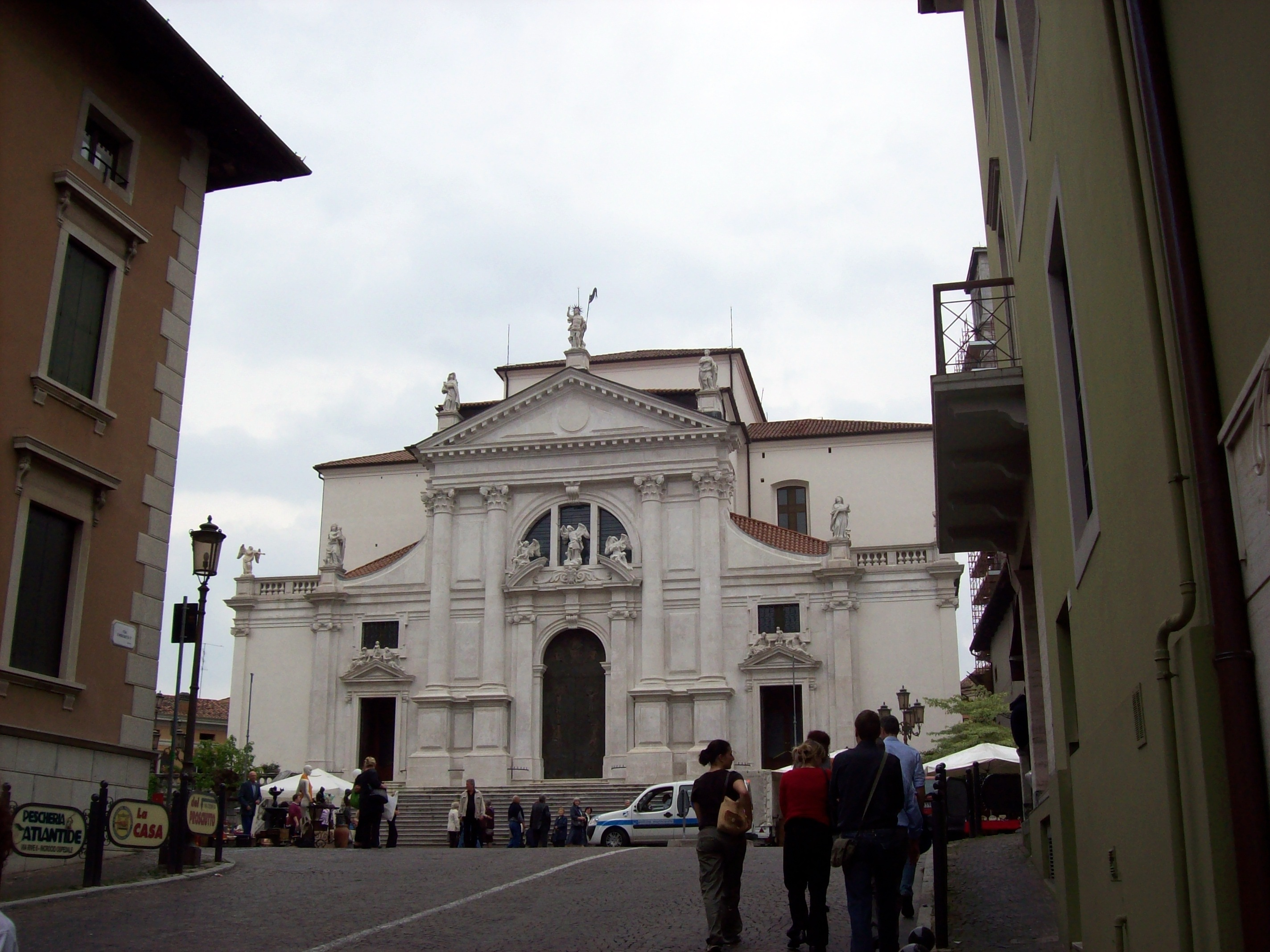 San Daniele del Friuili (UD-Italy), il Duomo di San Michele Arcangelo